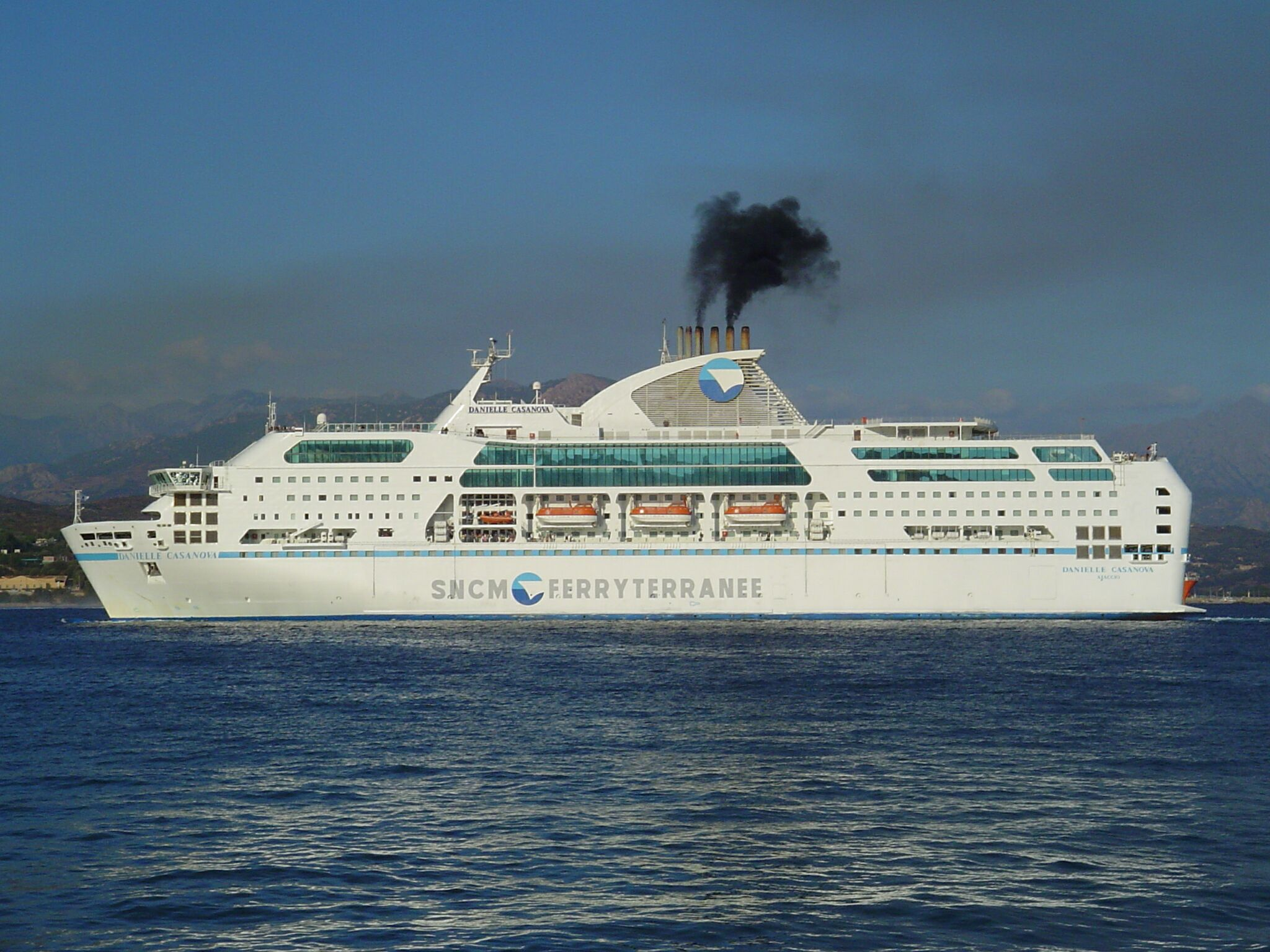 Le Danielle Casanova de 2002 dans le port d'Ajaccio en 2004.